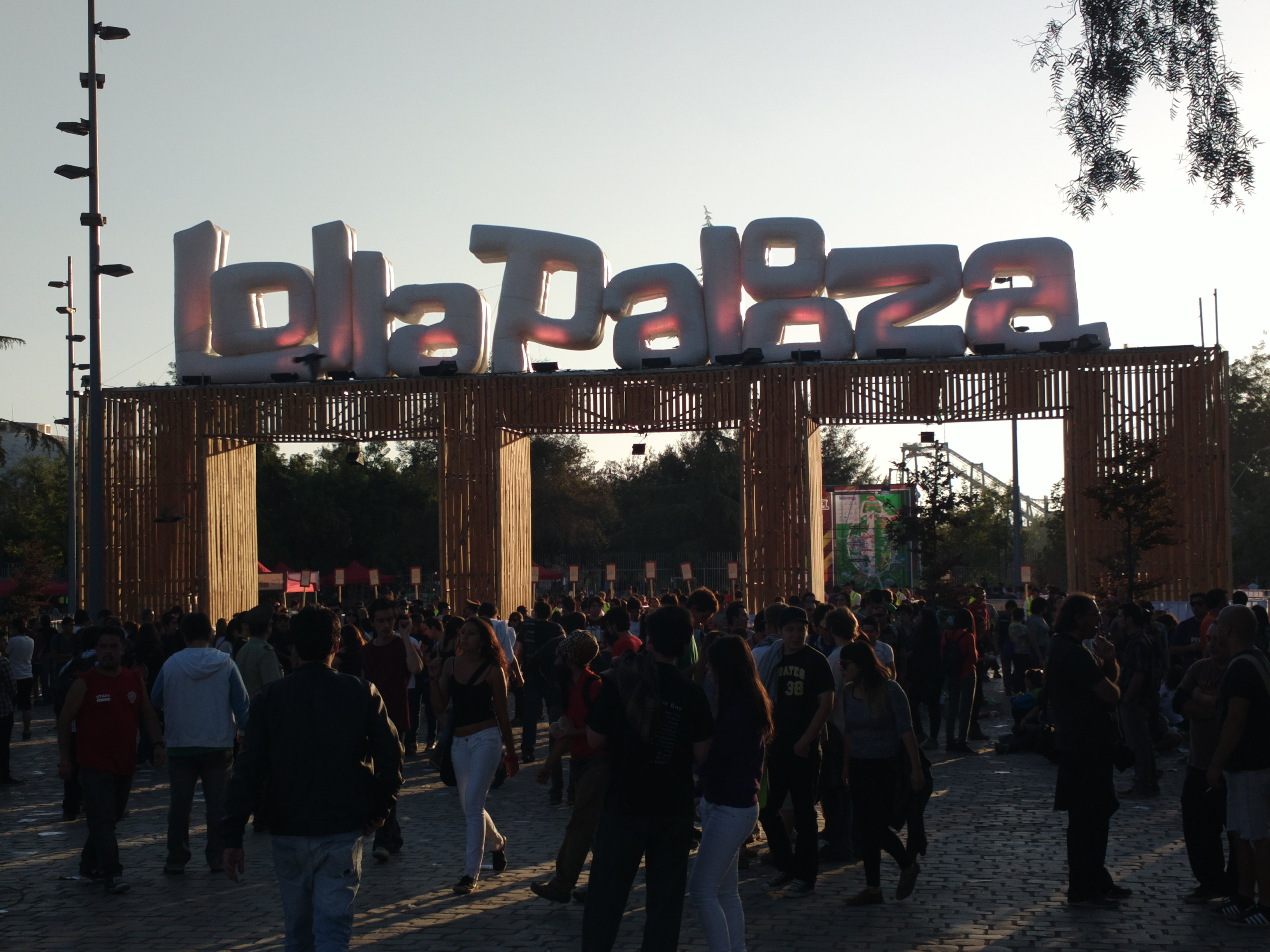 Una de las entradas al parque O'Higgins durante el festival Lollapalooza Chile 2013, en Santiago.